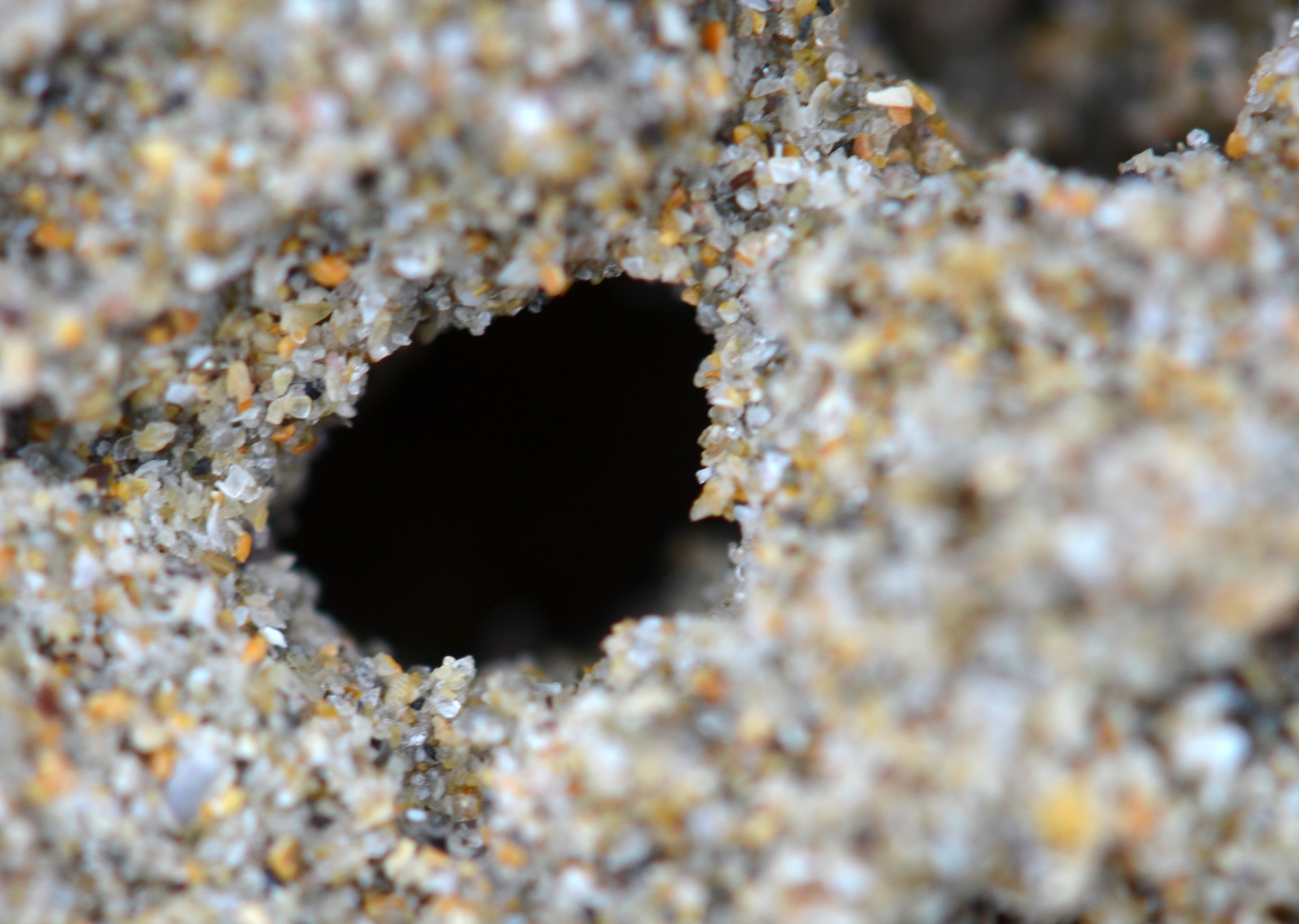 Entrée de galerie de talitre (Talitrus saltator), Plage de la Palue, près du Cap de la Chèvre, sur la presqu'île de Crozon, dans le Finistère (Ouest de la France).